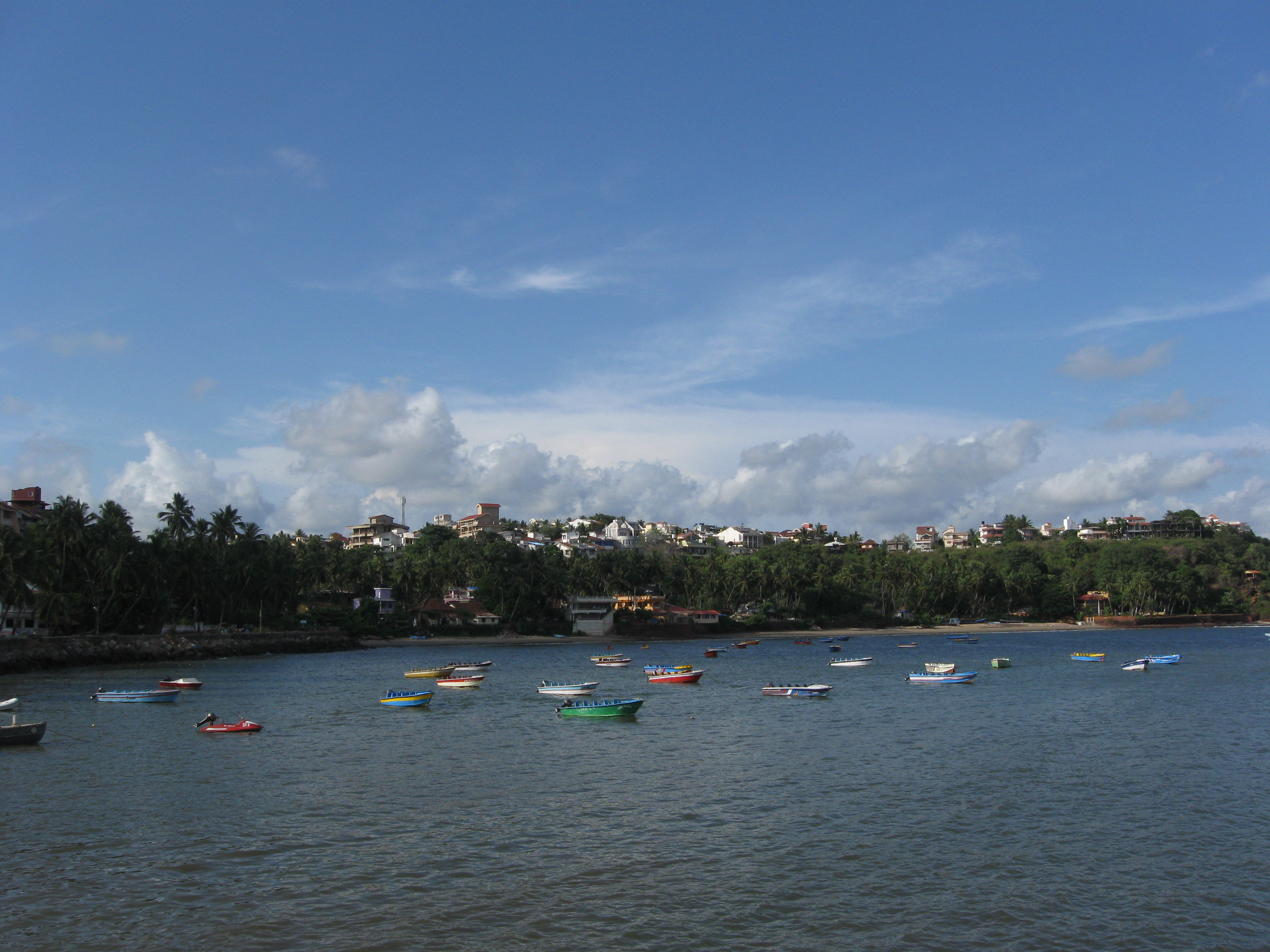 Boats sit Dona Paula Beach, Panjim